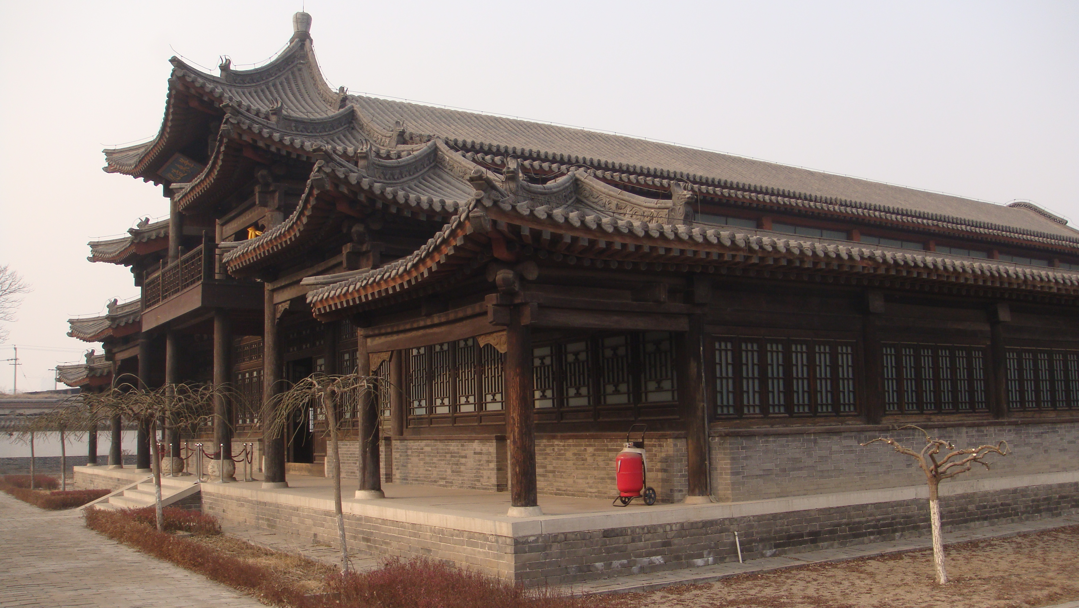 Dingzhou, Baoding, Hebei, China